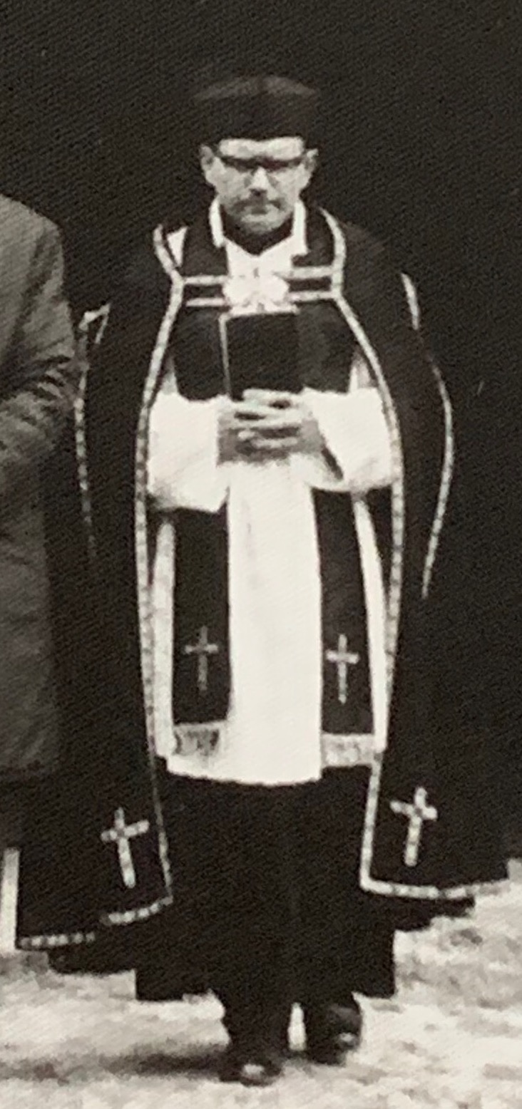 P. Václav Černý před kostelem sv. Gotharda v Brozanech nad Ohří, 70. léta 20. století